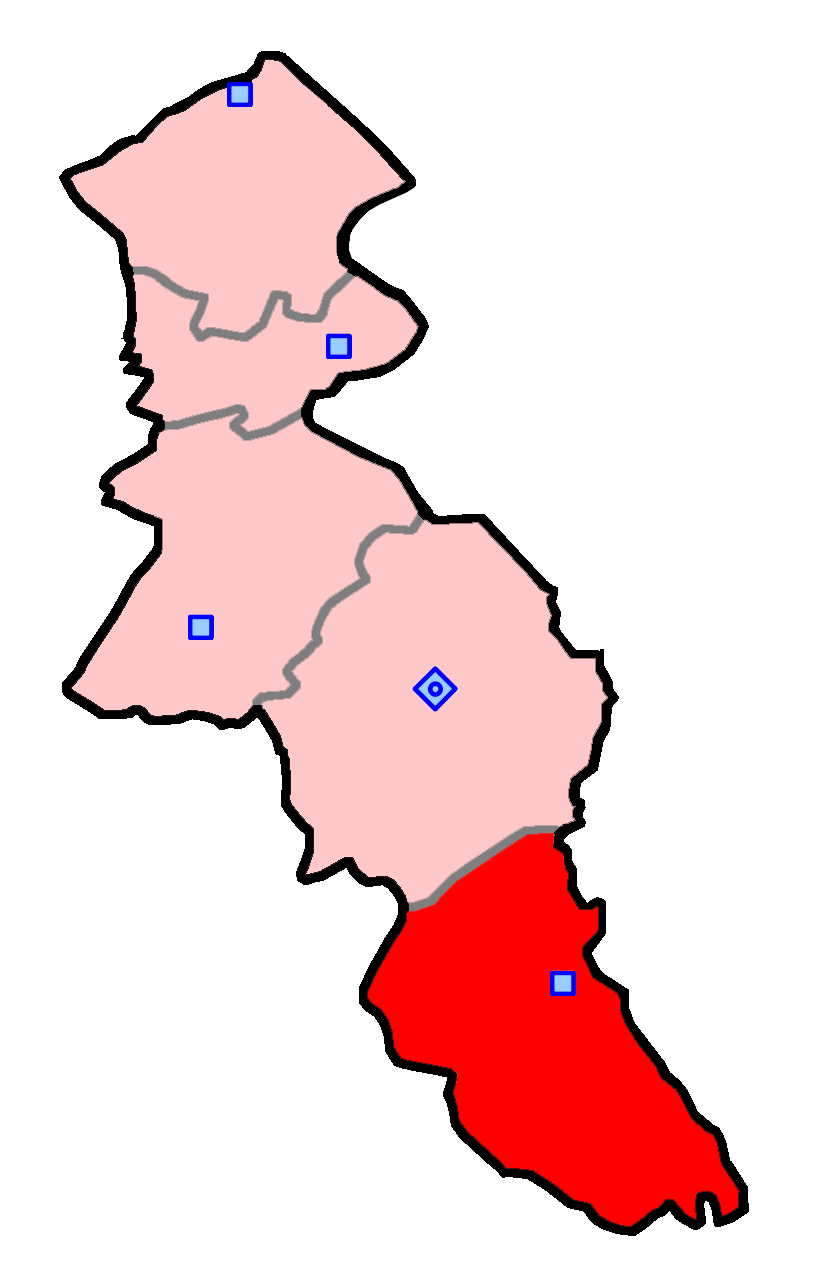 حوزهٔ انتخاباتی خلخال و کوثر برای انتخابات مجلس شورای اسلامی